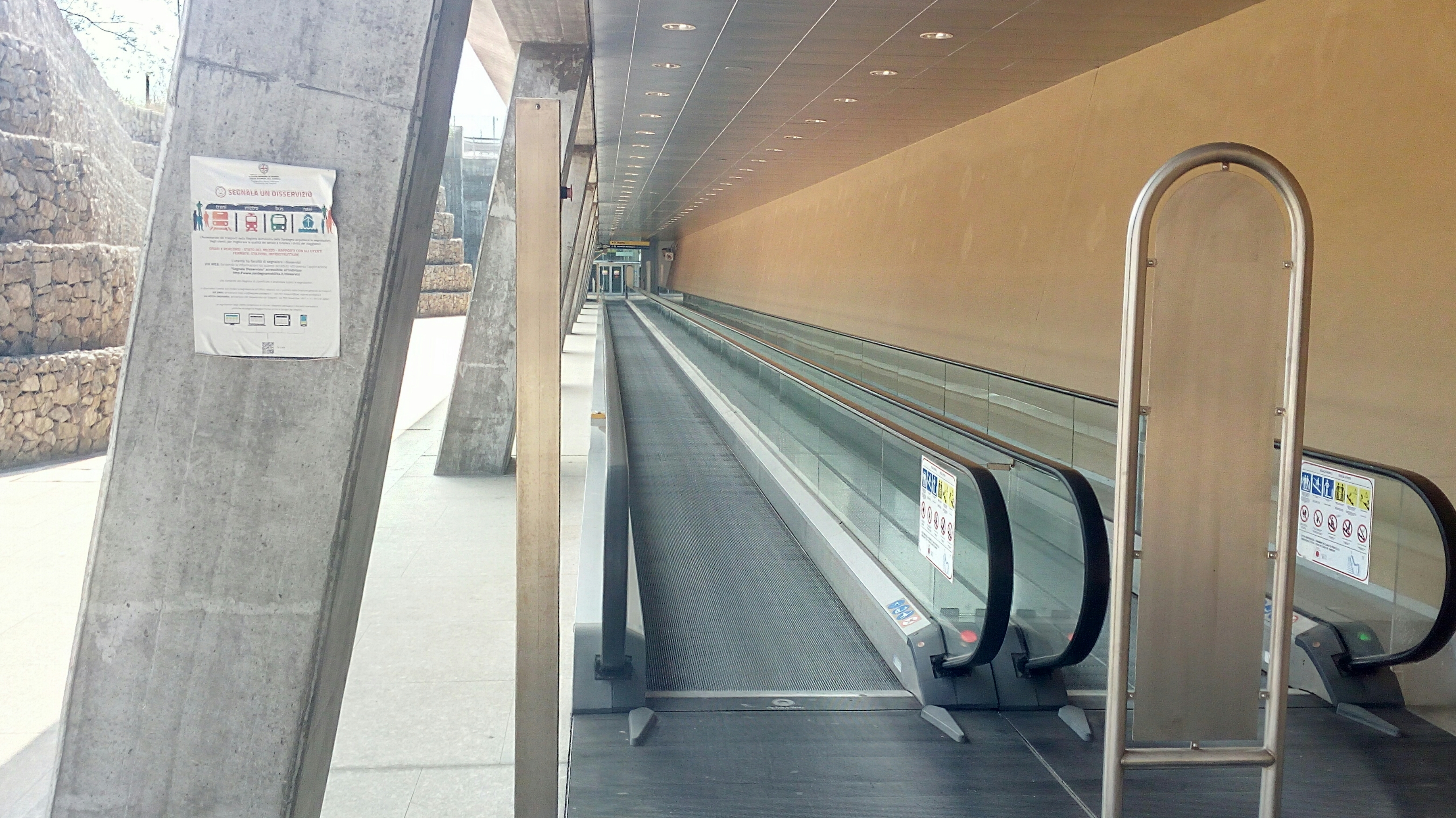 I tappeti mobili lungo il percorso tra l'aerostazione e la stazione ferroviaria di Elmas Aeroporto.